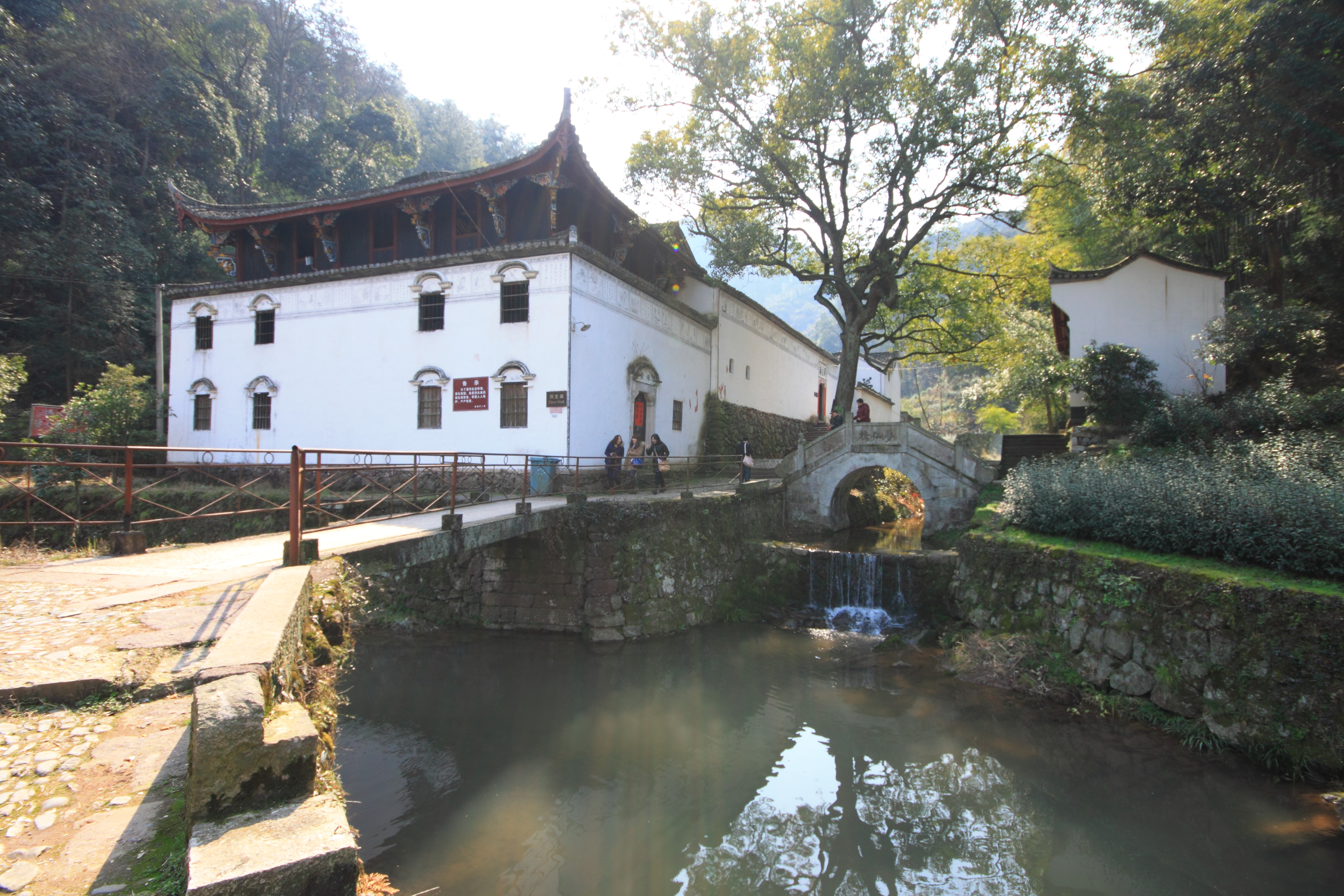 俞源村洞主庙，位于中国浙江省武义县。